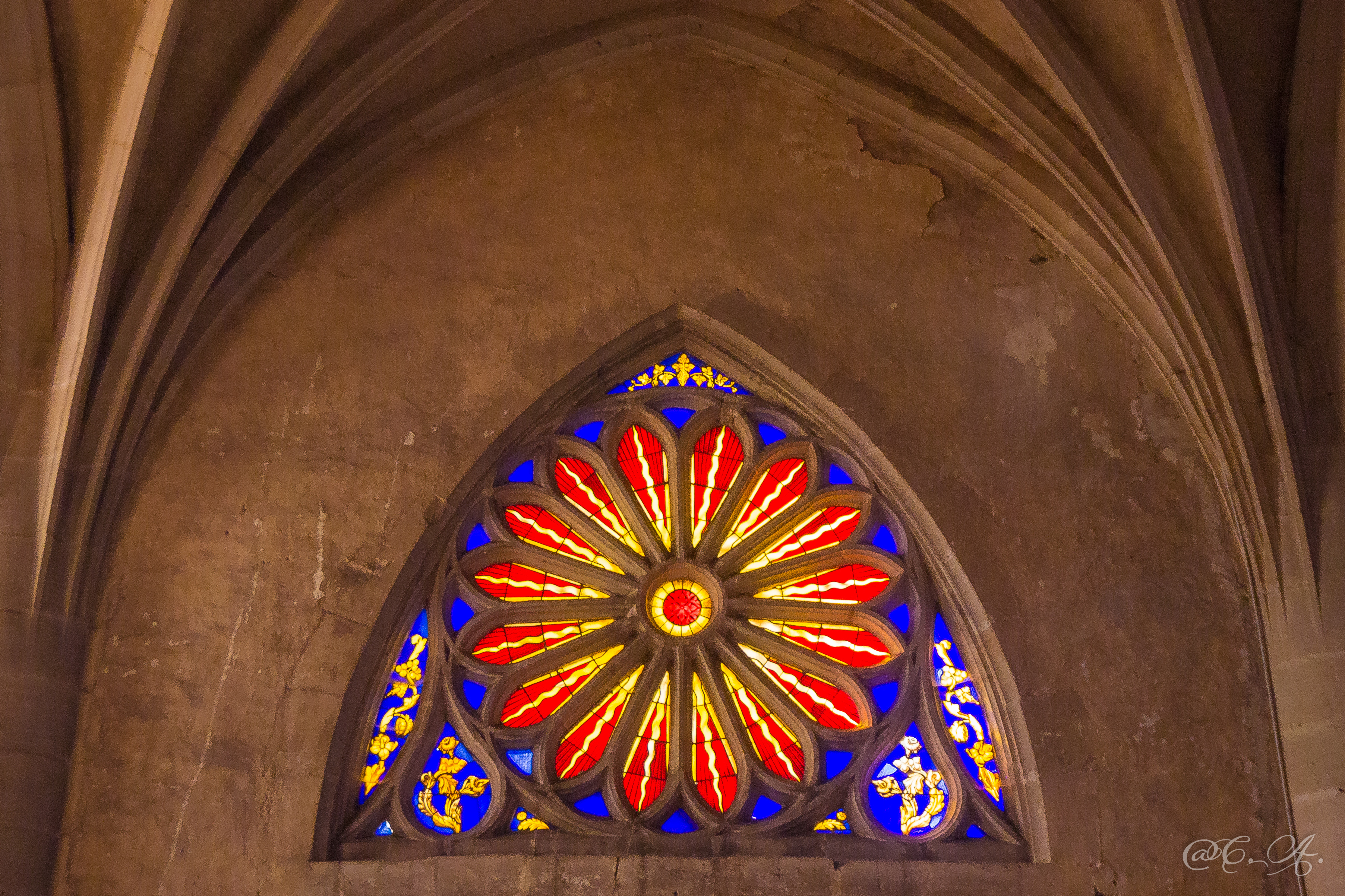 Rosace - Eglise Saint Gorgon de Varangéville